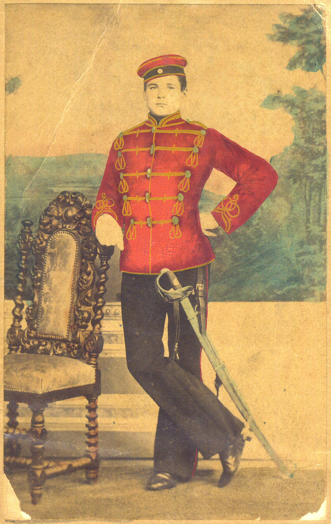 Unterleutnant des Leib-Garde-Husarenregiments in Potsdam